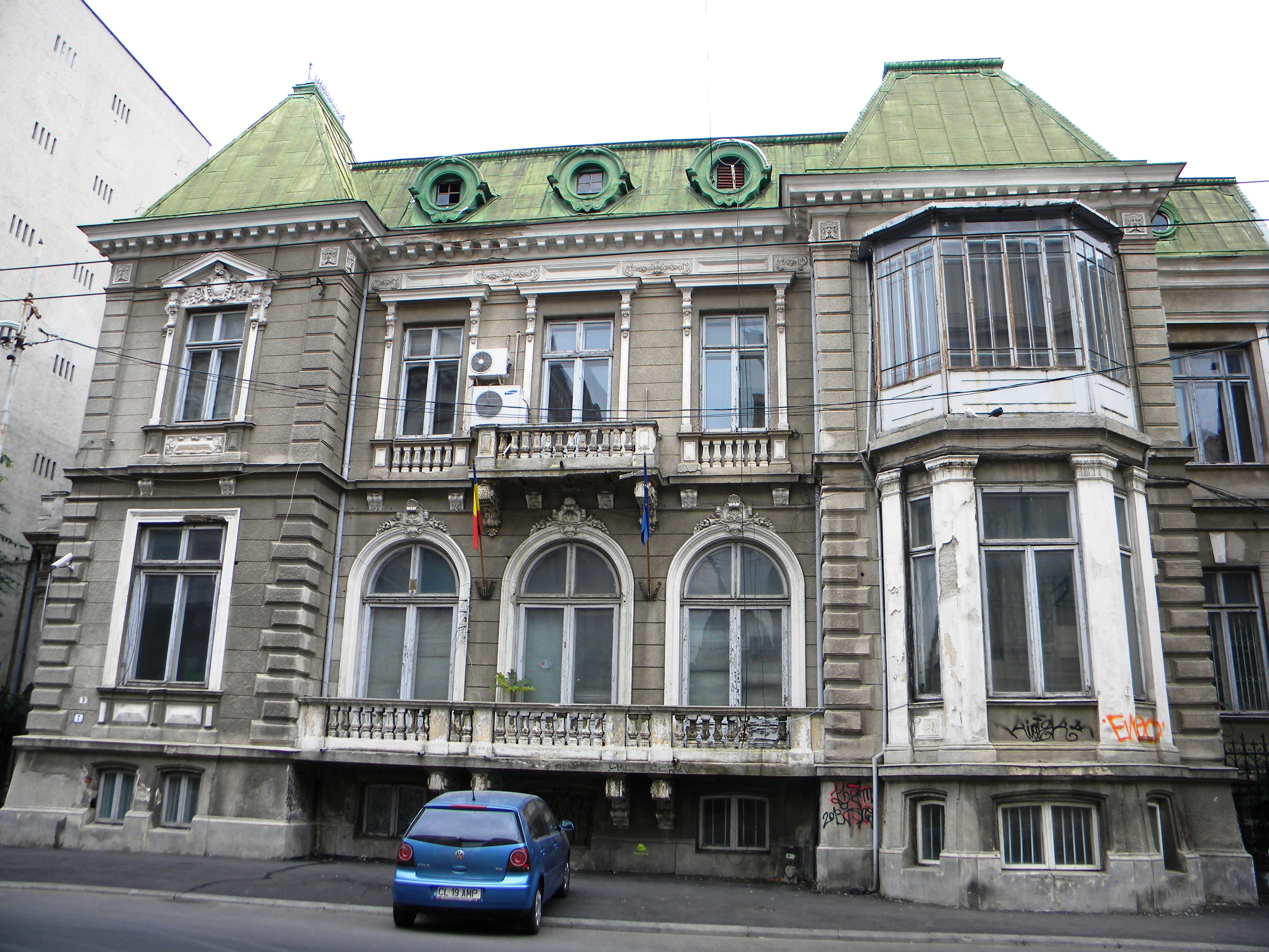 Bucuresti, Romania, Casa Sutu (Lahovary), Calea Grivitei nr. 7, sect. 1